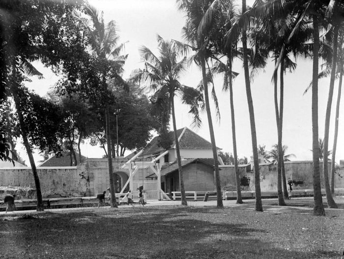 Negatief. Fort "Engelenburg" te Klaten, Midden-Java